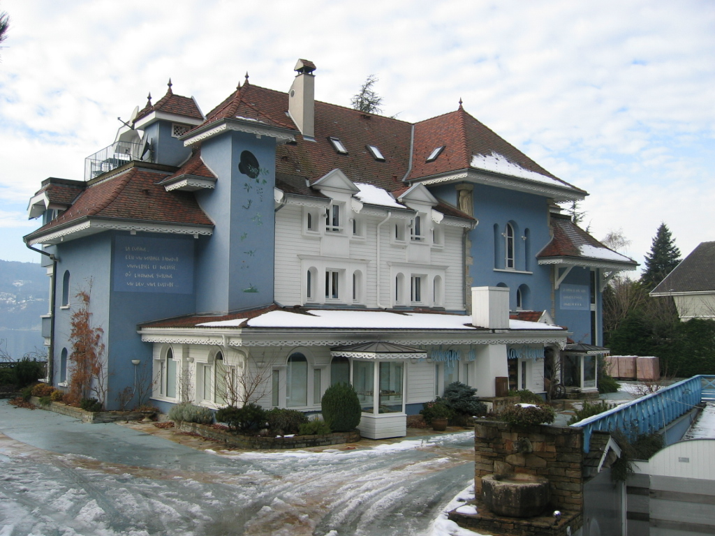 Restaurant 4 etoiles de Marc Veyrat à Veyrier du Lac au bord du Lac d'Annecy